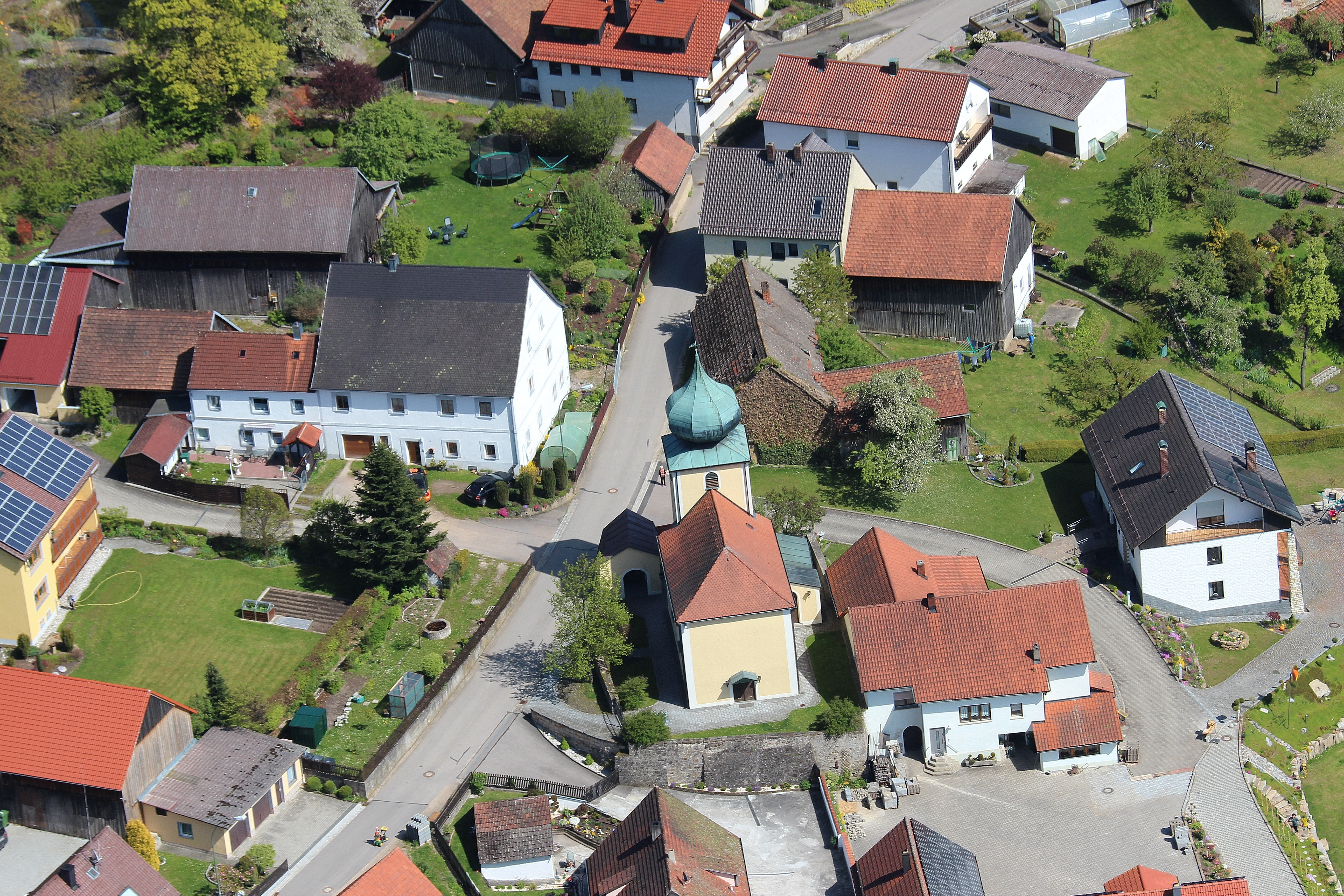 Taxöldern, Gemeinde Bodenwöhr, Landkreis Schwandorf, Oberpfalz, Bayern